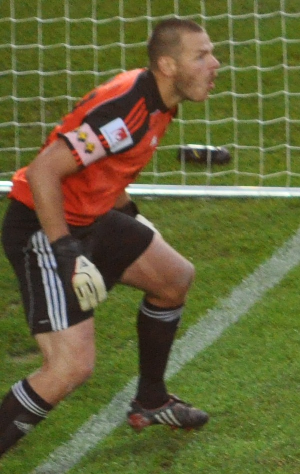 Daniel Örlund